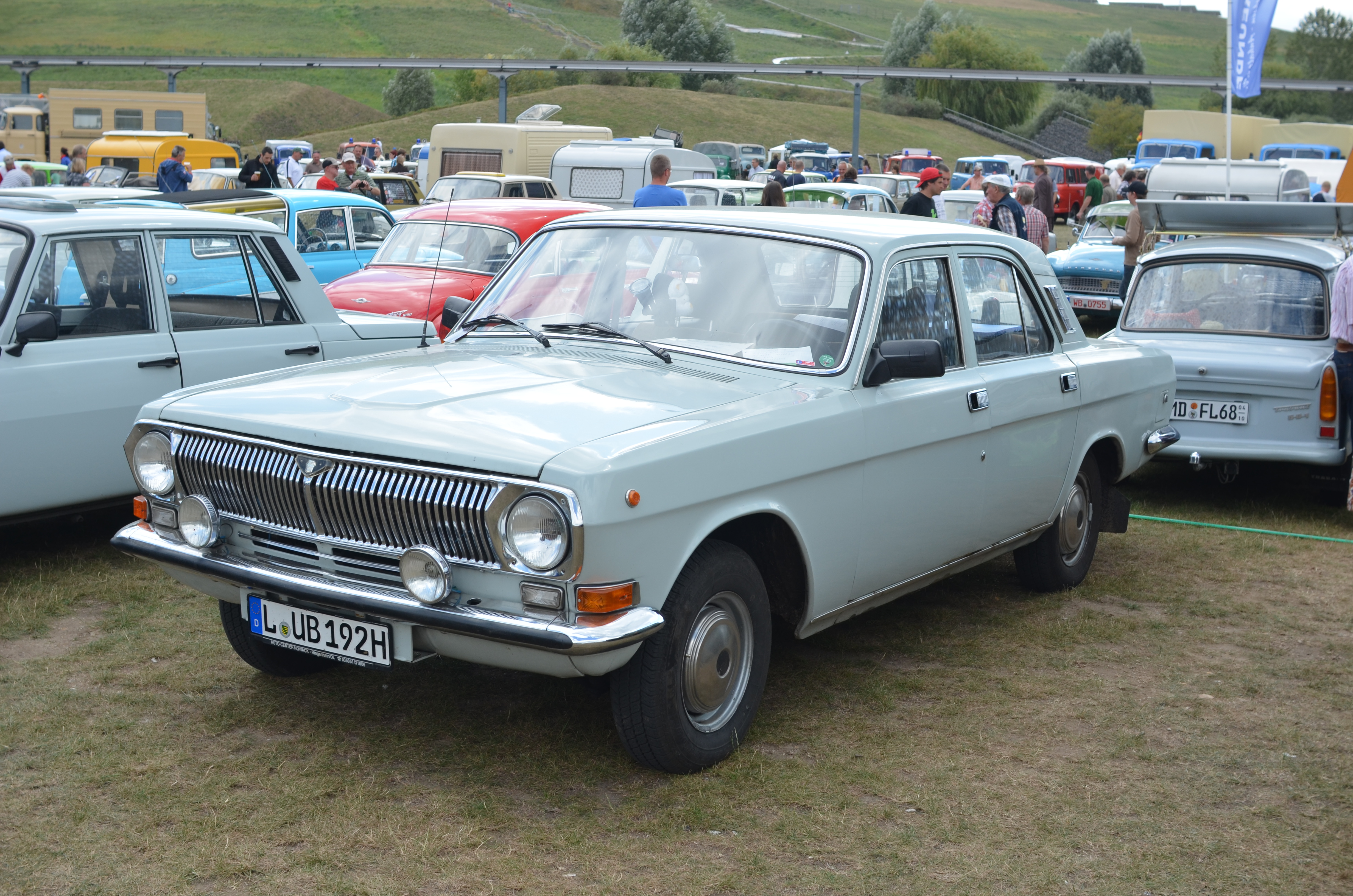 Wolga